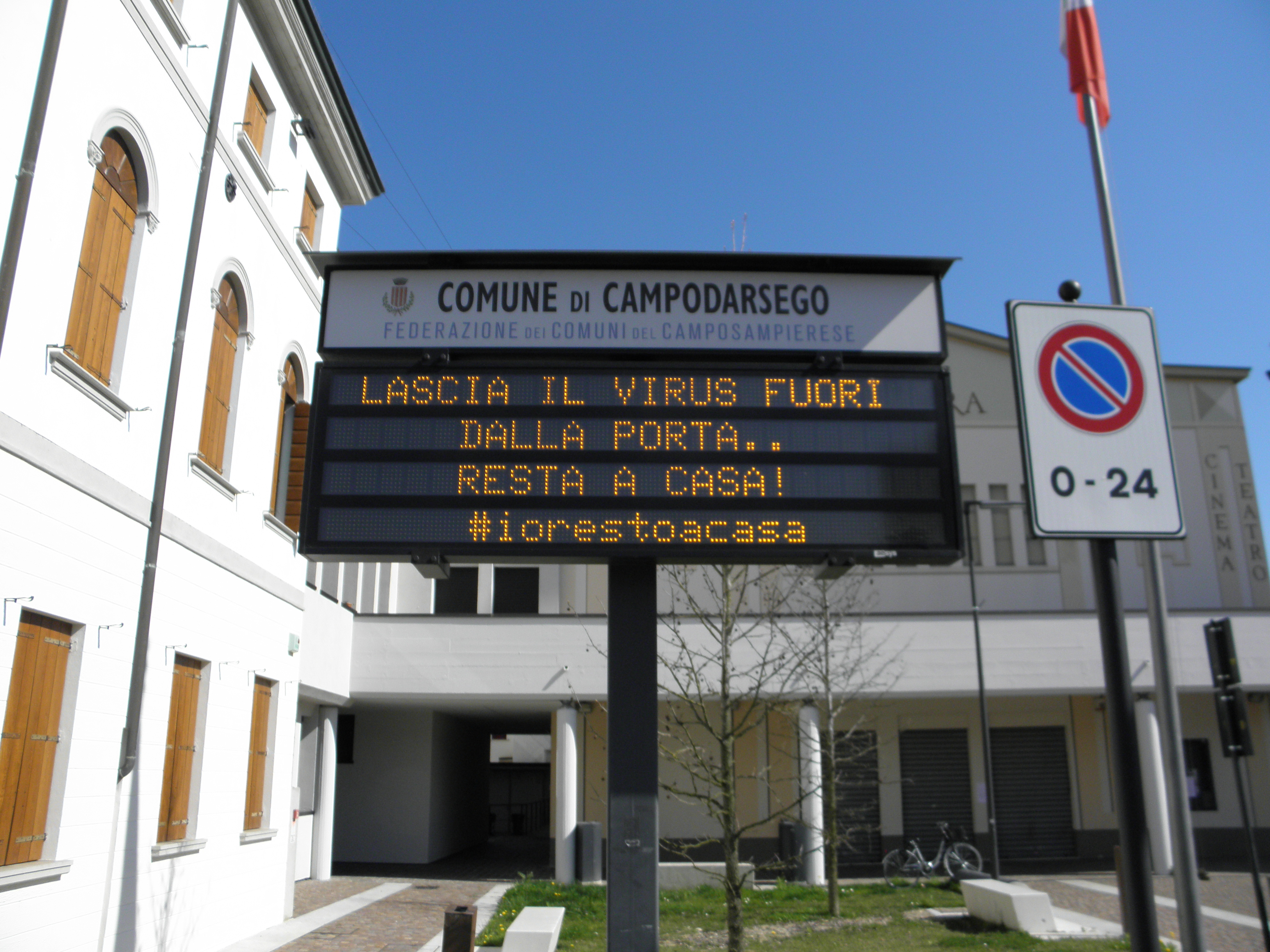 Campodarsego, piazza Europa: il tabellone elettronico informativo con indicazioni sullepidemia di COVID-19.